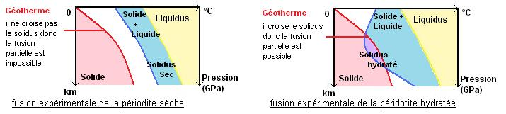 fusion expérimentale de la péridotite sèche et hydratée. Solidus, liquidus et geotherme